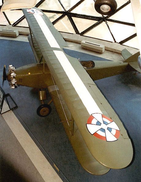 Школски авион Физир ФН са ознакама РВ Краљевине Југославије.